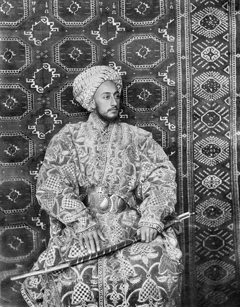 Чарджуйский бек